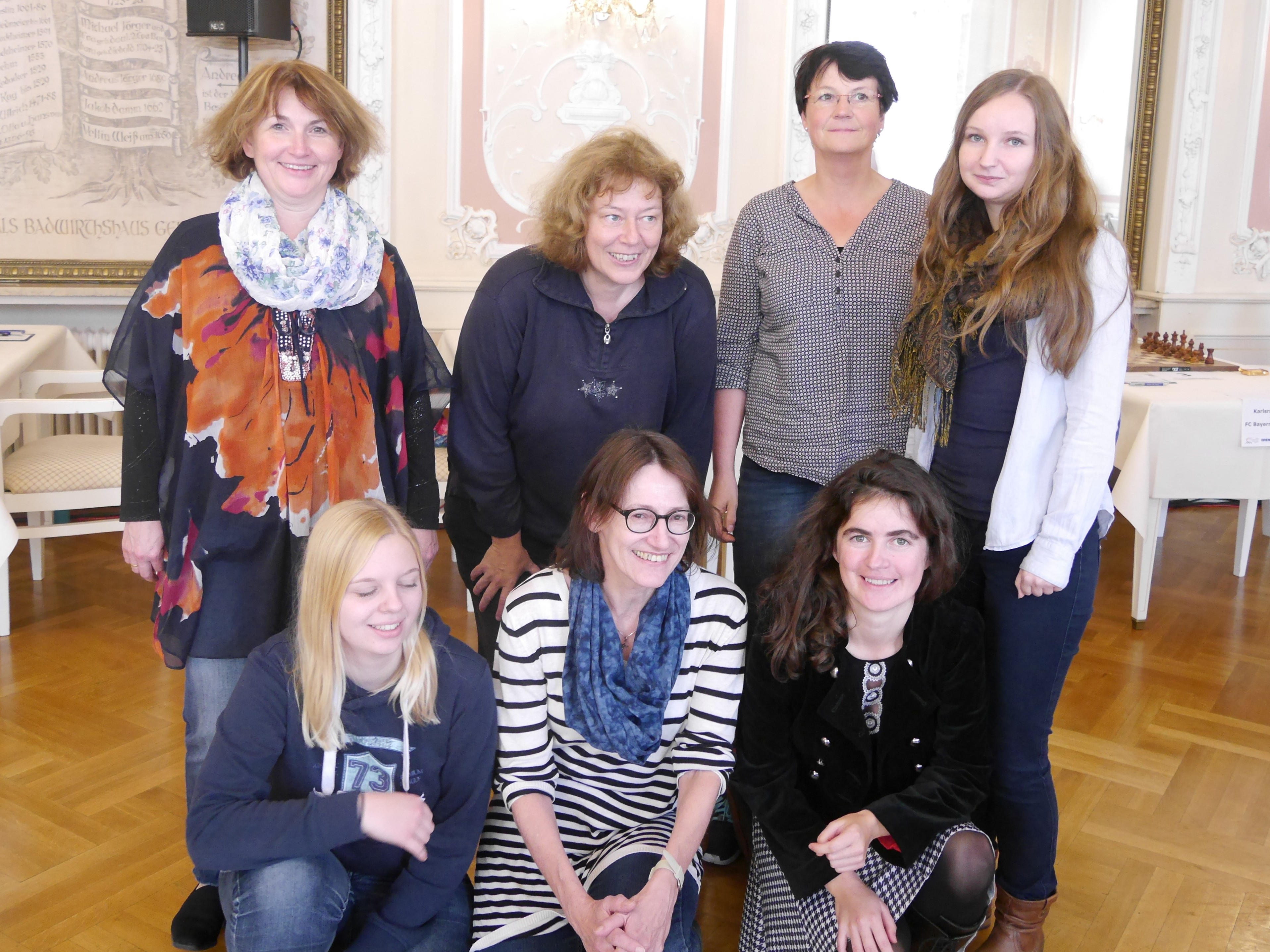 Frauen der SG Augsburg, Schachbundesliga der Frauen 2016/17 in Baden-Baden. Von links nach rechts: Olga Birkholz, Kristin Braun, Maria Horvath, Ursula Münch, Astrid Amelang, Katarzyna Woniak und Lisa Hapala